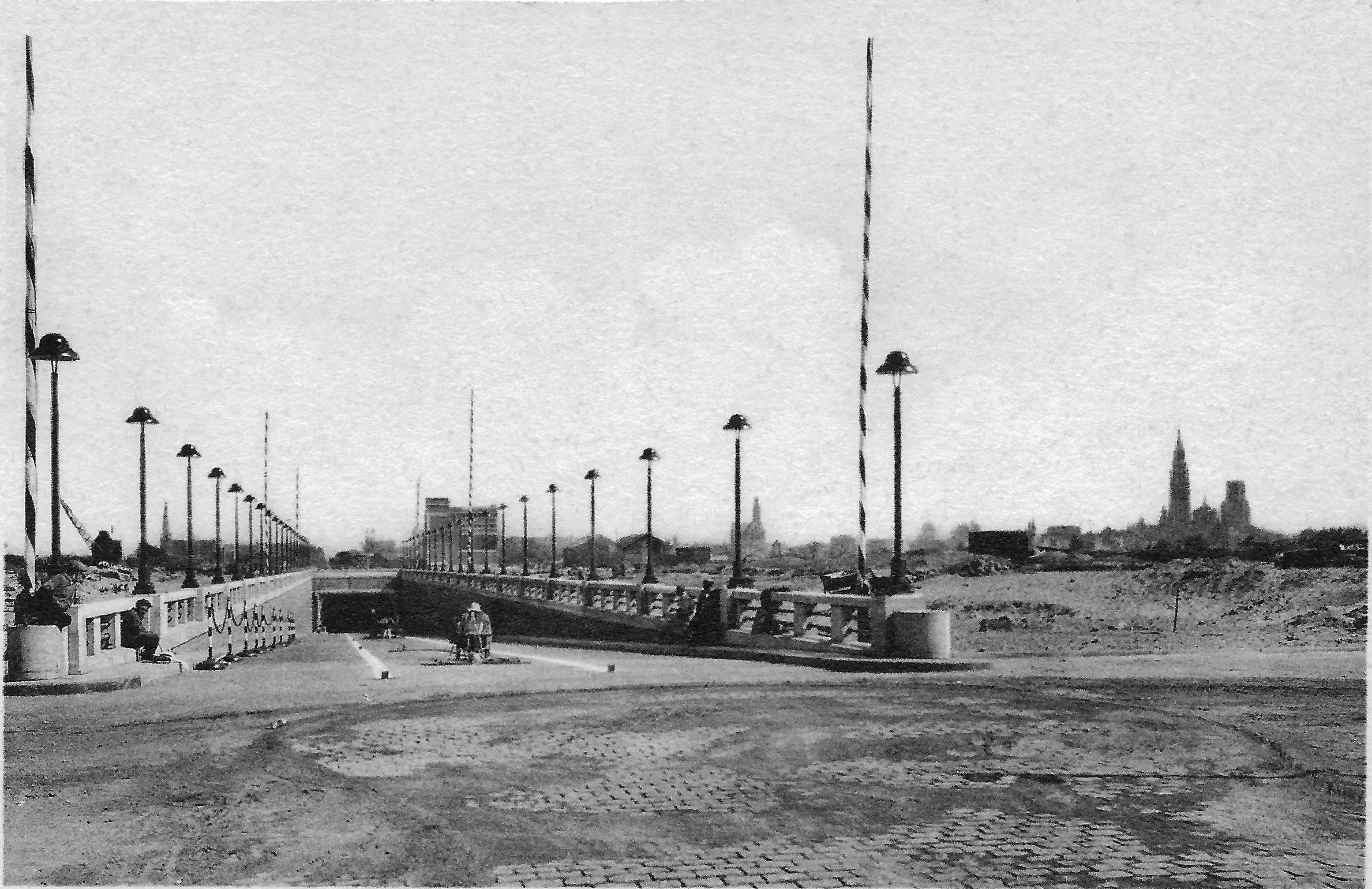 De Waaslandtunnel ingang in Linkeroever voor de opening.